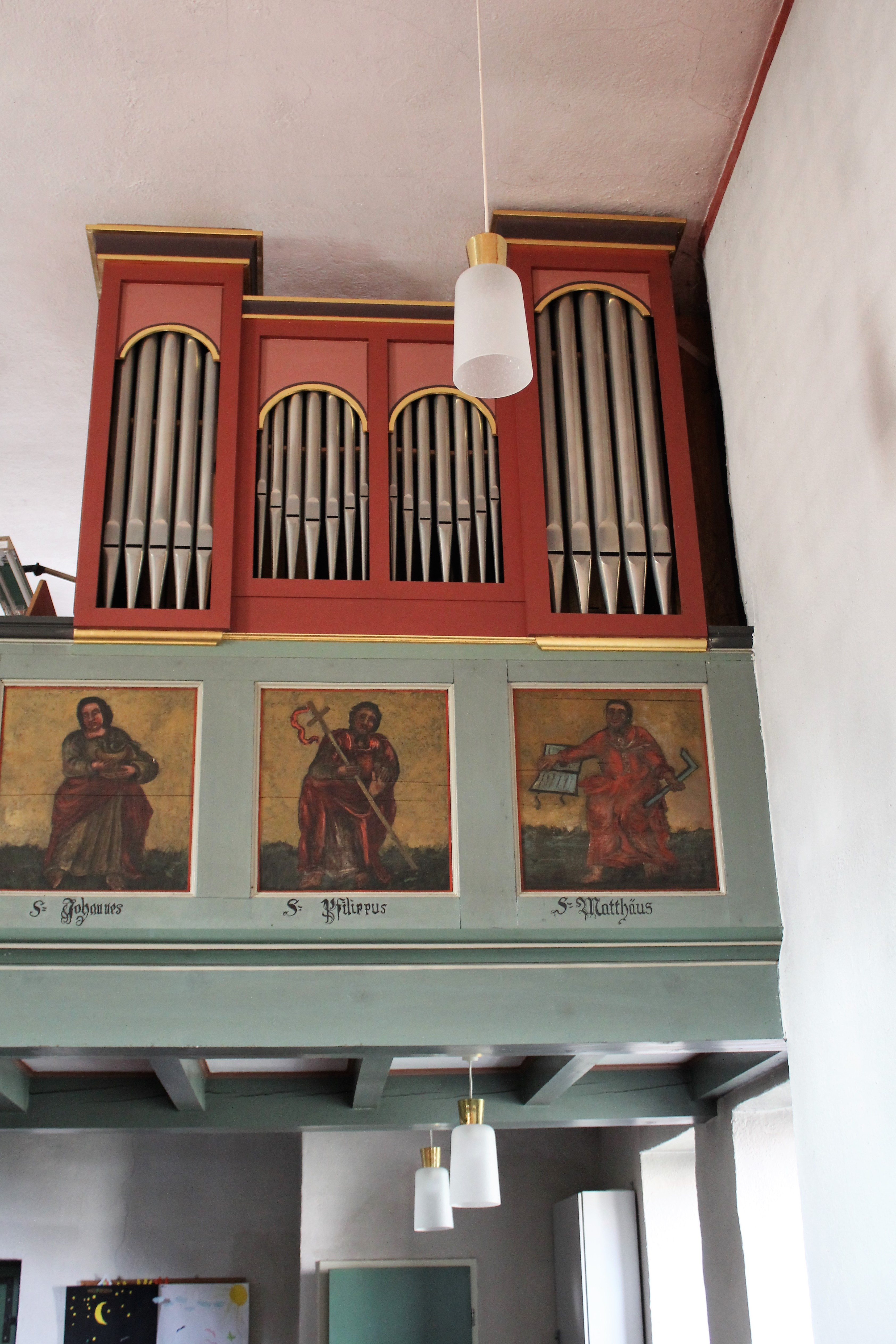 Evanglische Kirche Weipoltshausen, Gemeinde Lohra, Landkreis Marburg-Biedenkopf, Hessen, Deutschland